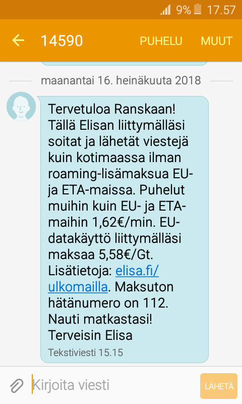 Elisan tervetuloa Ranskaan tekstiviesti. Tekstiviesti sisältää myös hintatiedot.